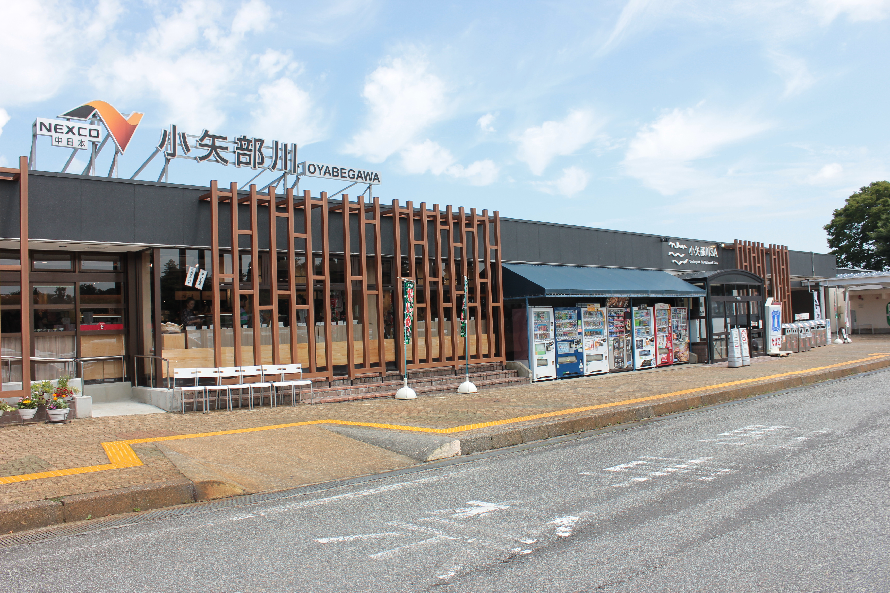 小矢部川サービスエリア（下り線、改築後） Canon EOS Kiss X5